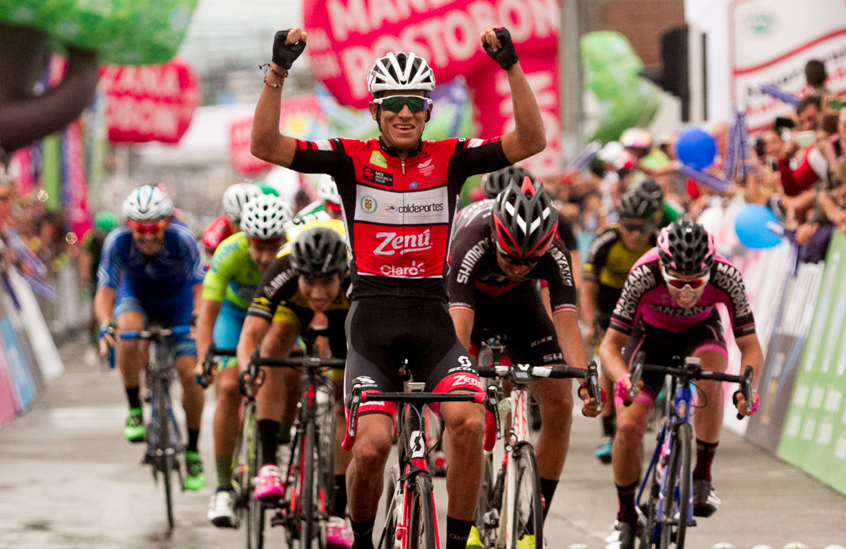 Sprint final Etapa 10 Vuelta a Colombia 2017 Viernes 11 de agosto de 2017. Cartago - Yumbo 176,1 Kms.